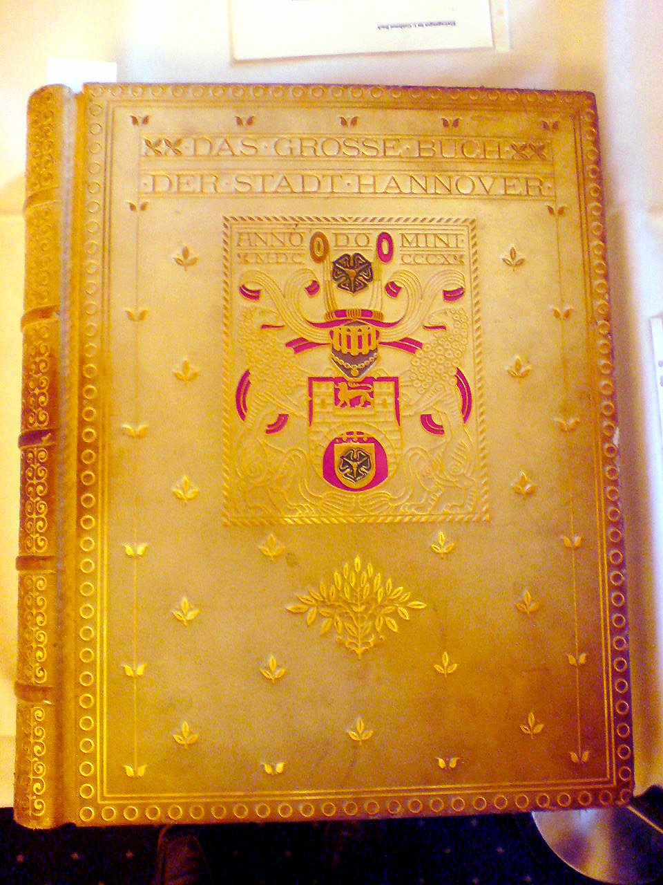 Goldenes Buch (Hannover): Umschlagdeckel mit dem Datum von 1910 ...